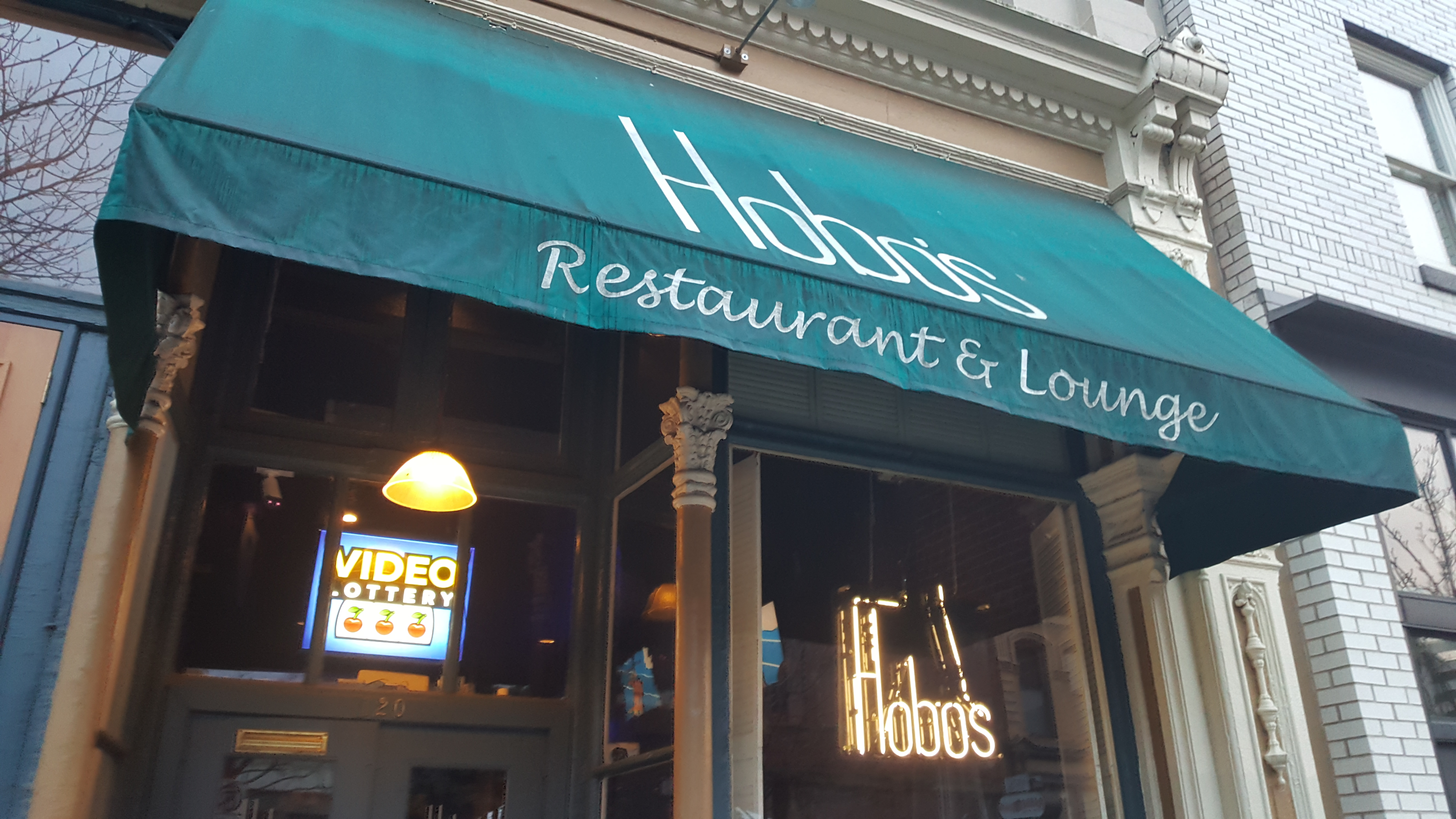 Hobo's